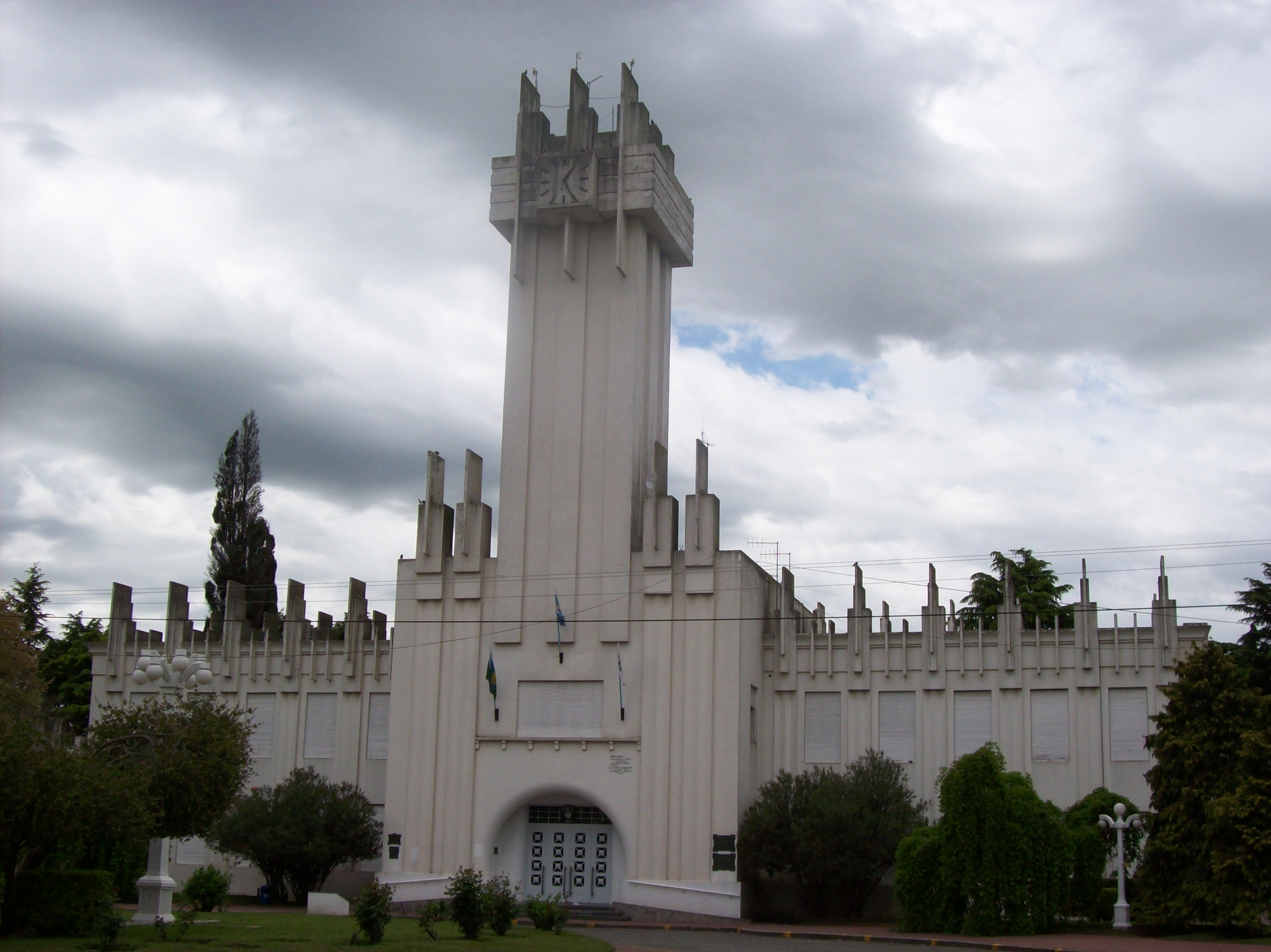 Palacio municipal de Rauch, Provincia de Buenos Aires, Argentina.